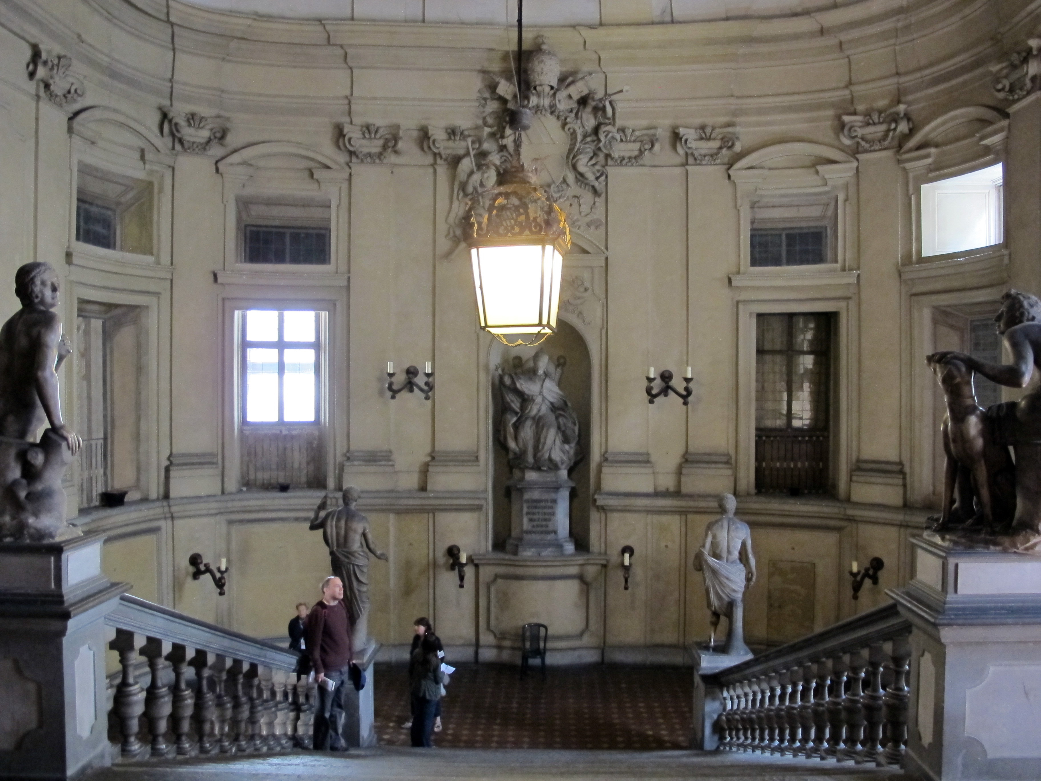 Palazzo corsini, scalone monumentale